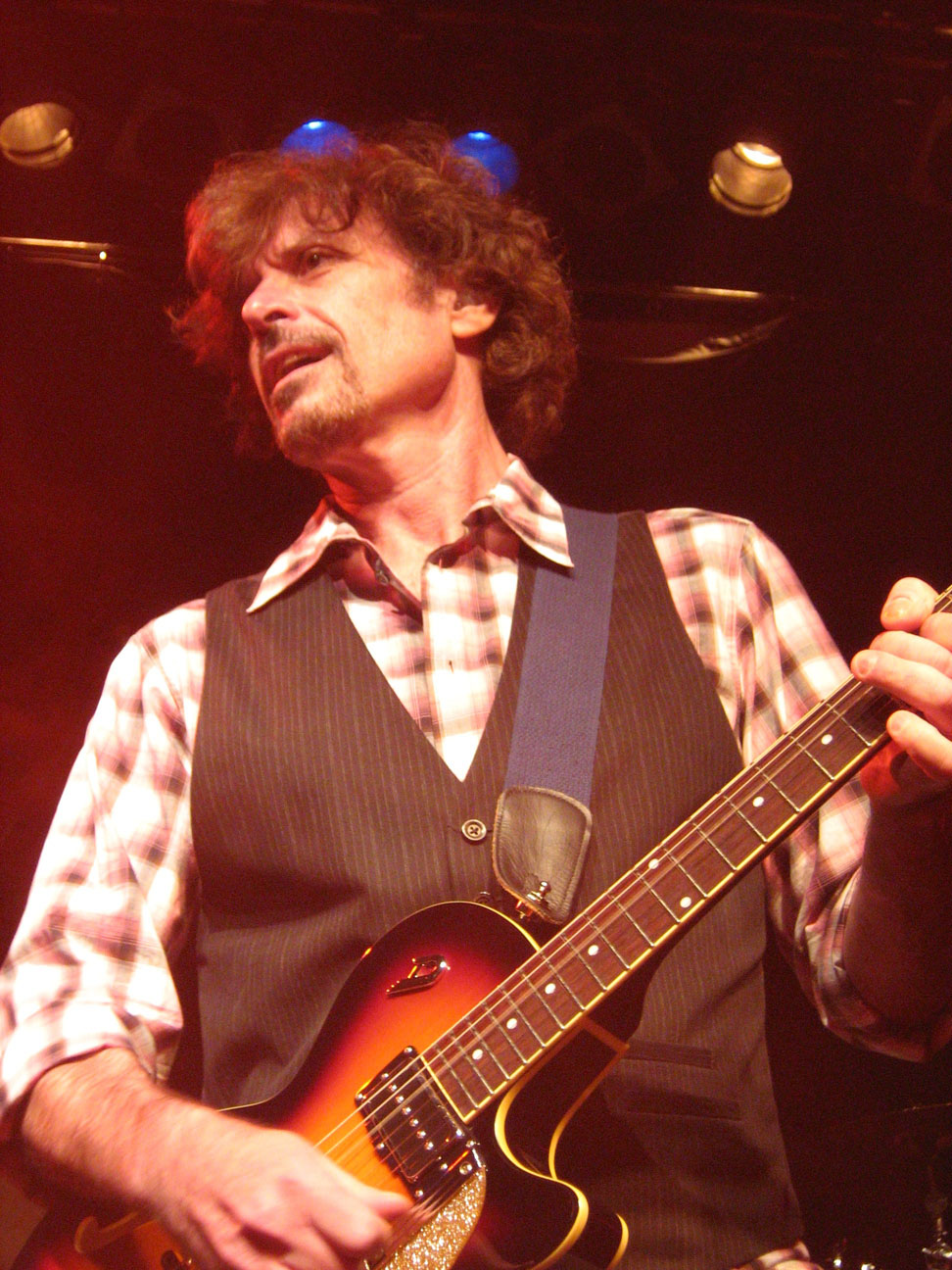 Eric Bazilian im Spectrum Augsburg 22.07.2008